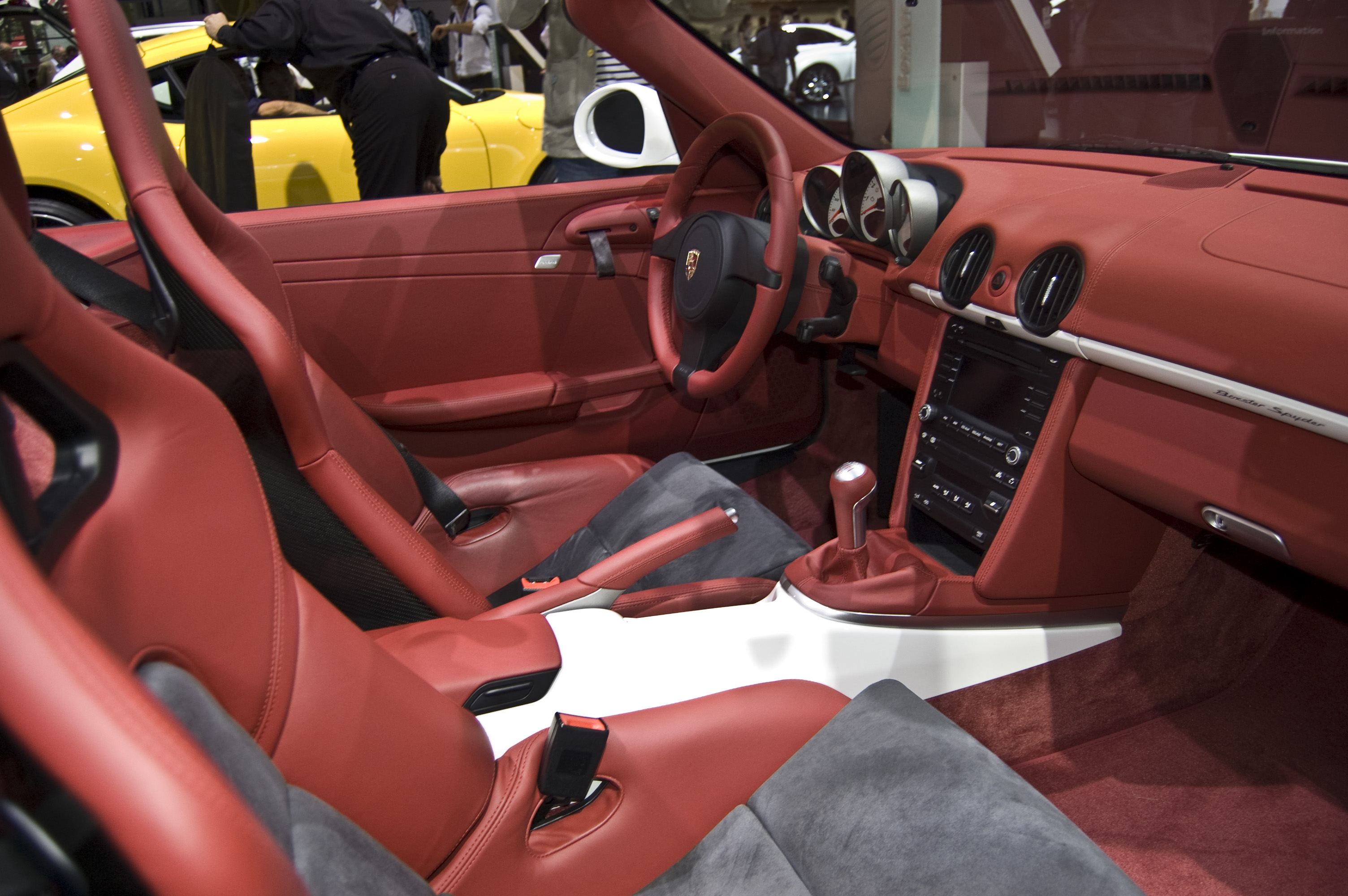 Porsche Boxster Spyder en el Salón de París 2010